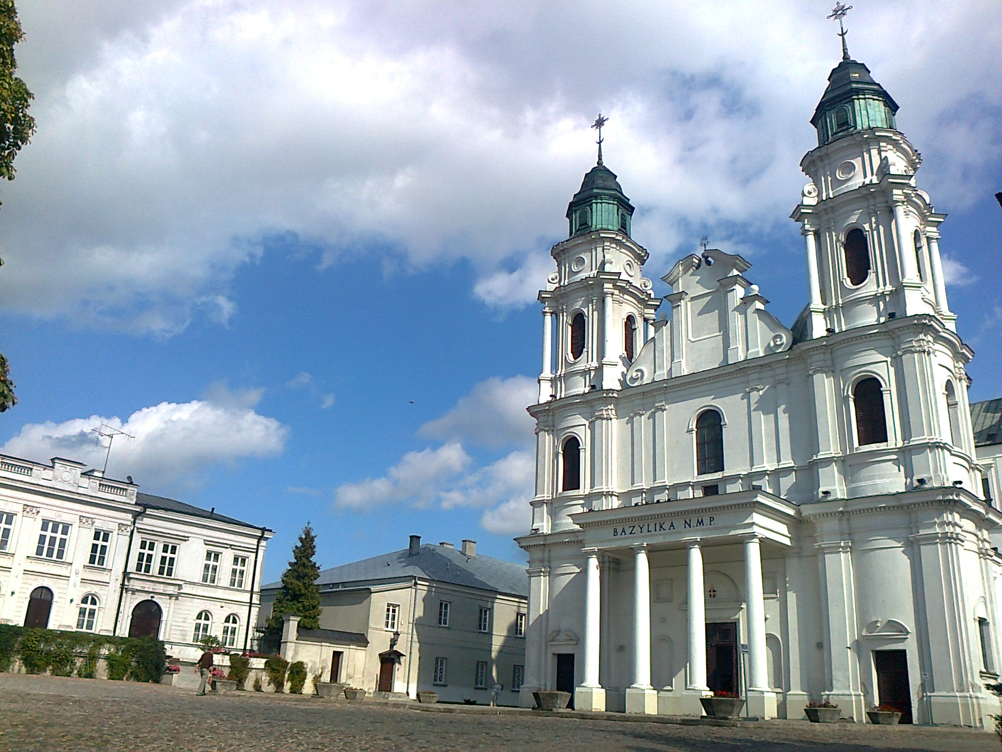 Bazylika Narodzenia NMP w Chełmie